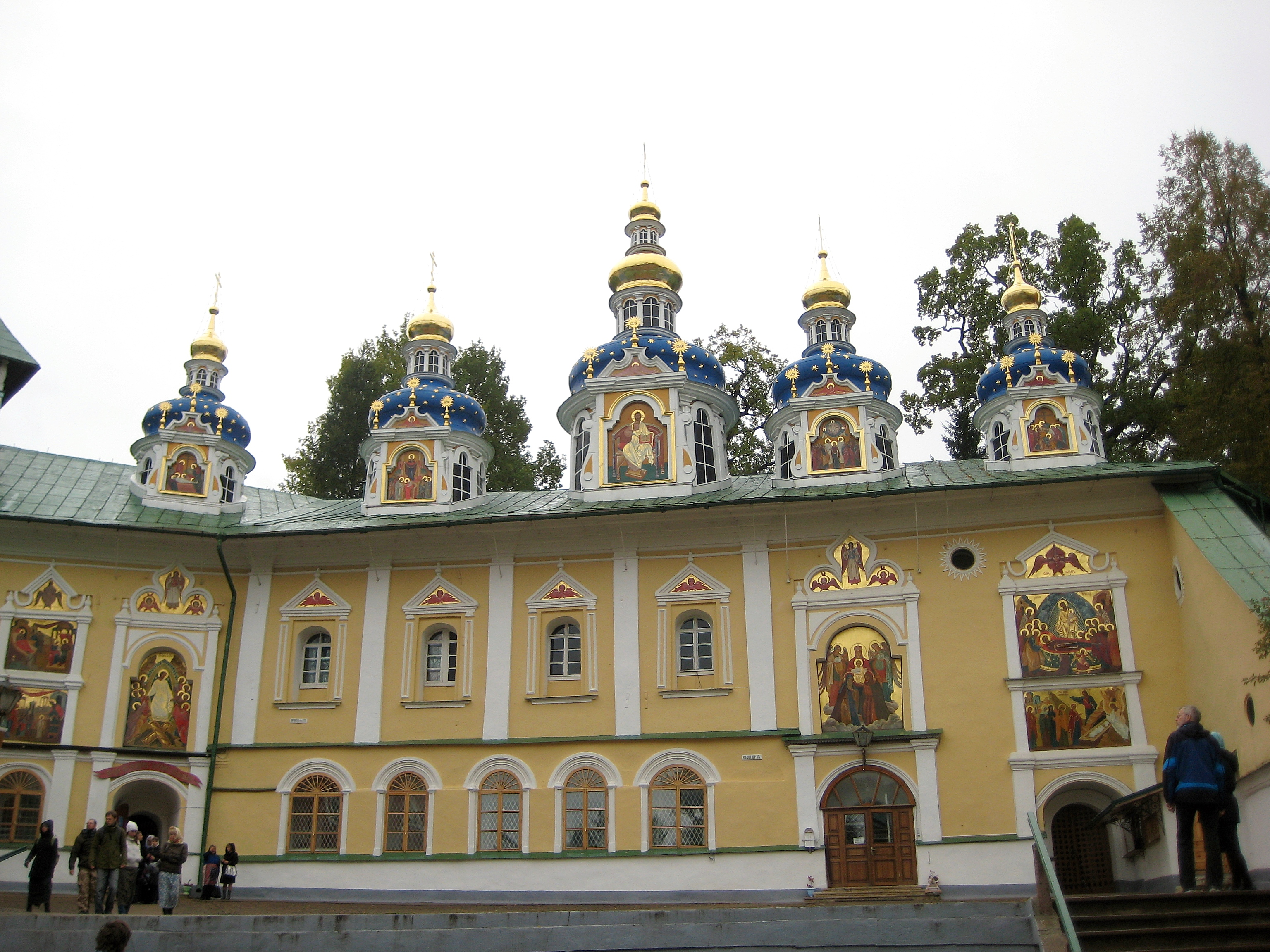 Печоры. Псково-Печерский монастырь. Успенская (1473г) и Покровская (1753-85гг) церкви.